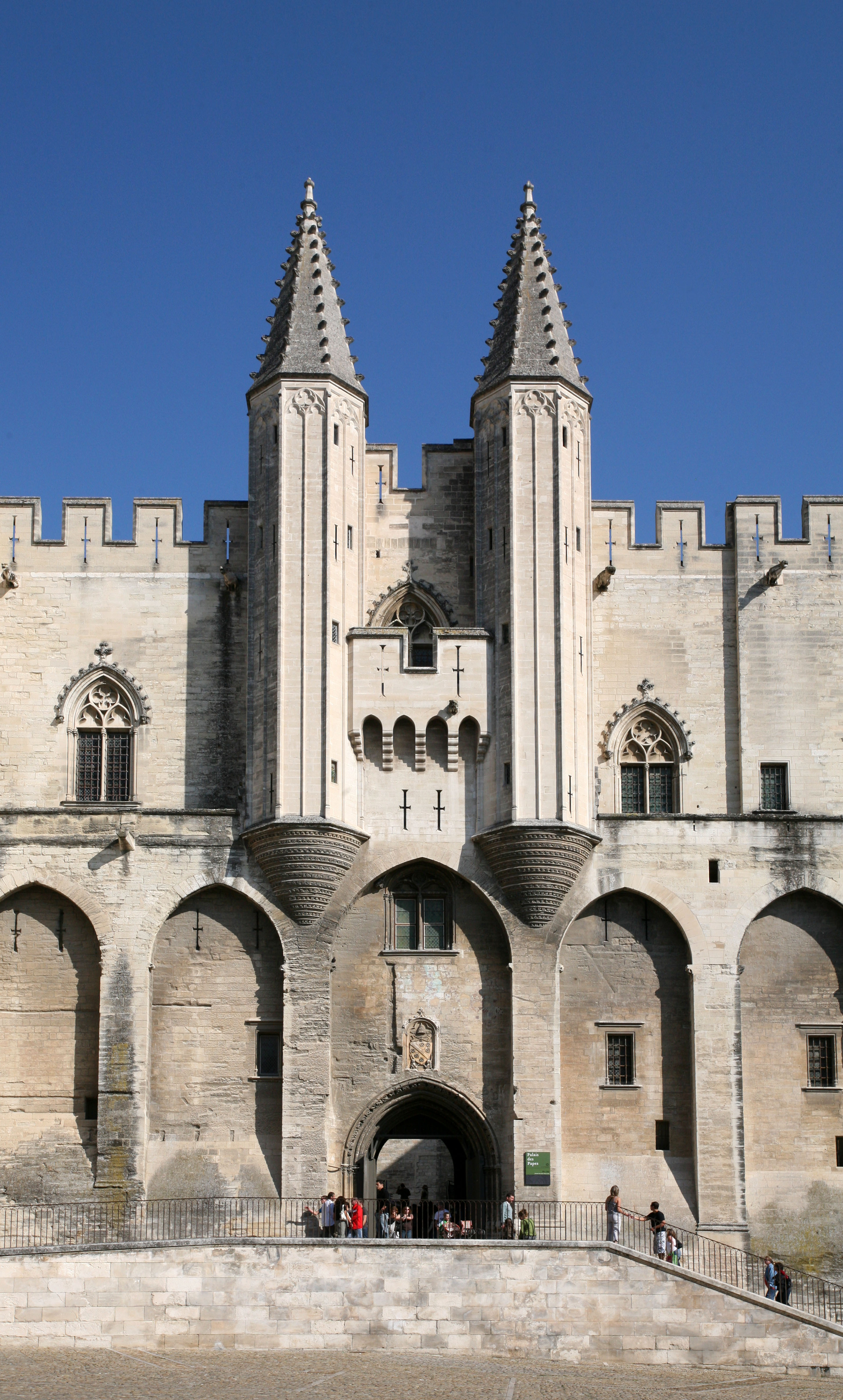 La Porte Champeaux et les deux tourelles